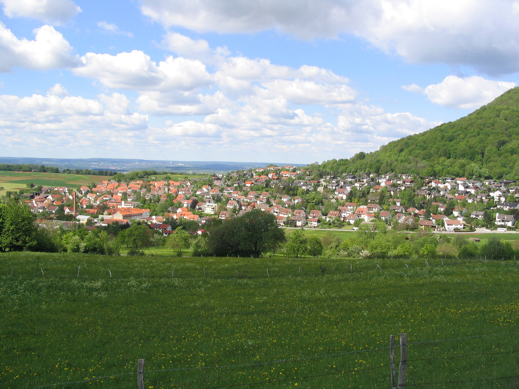 Blick über Öschingen aus südlicher Richtung